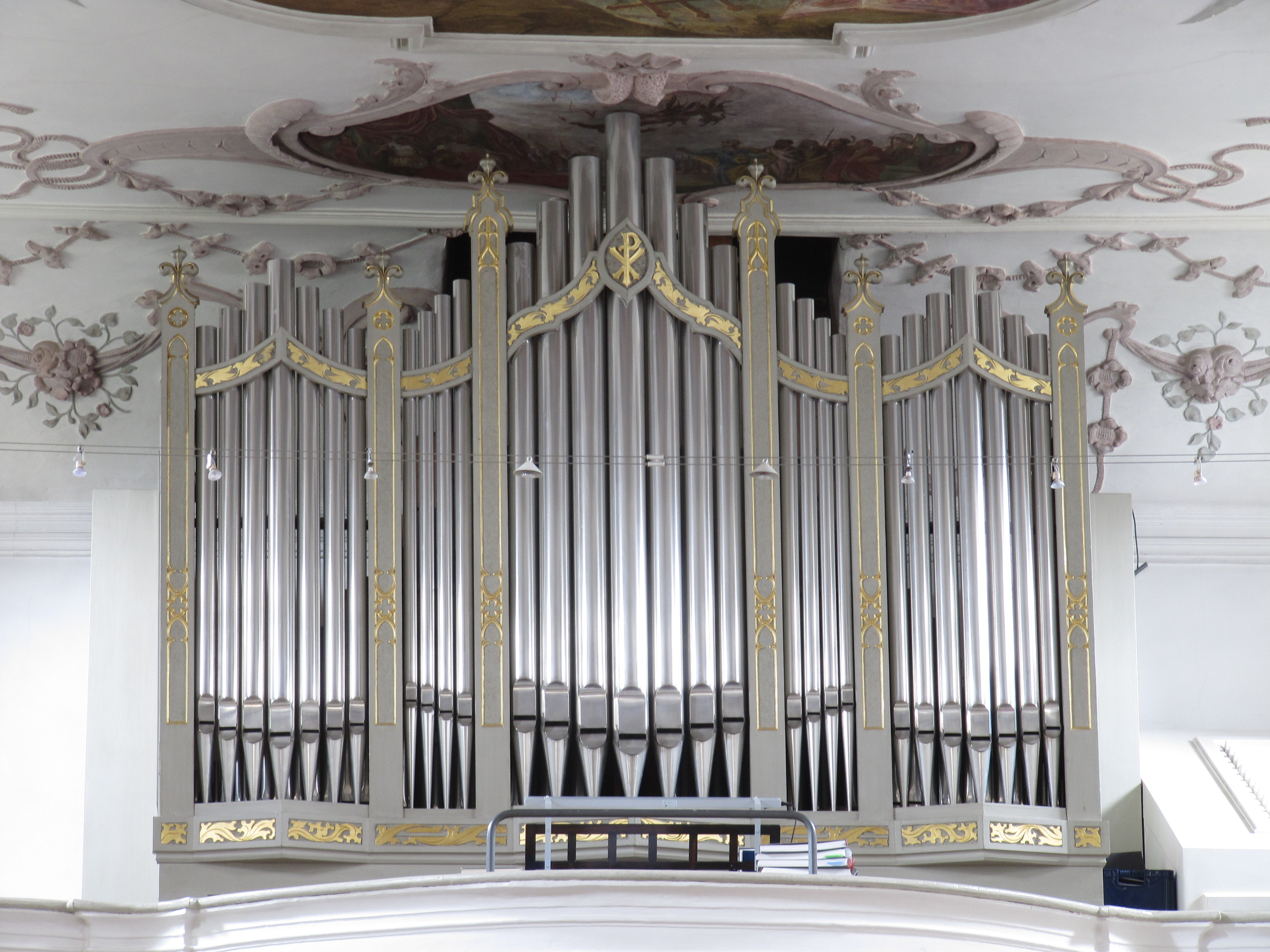 Orgel Wörth/Do erbaut von Binder & Siemann